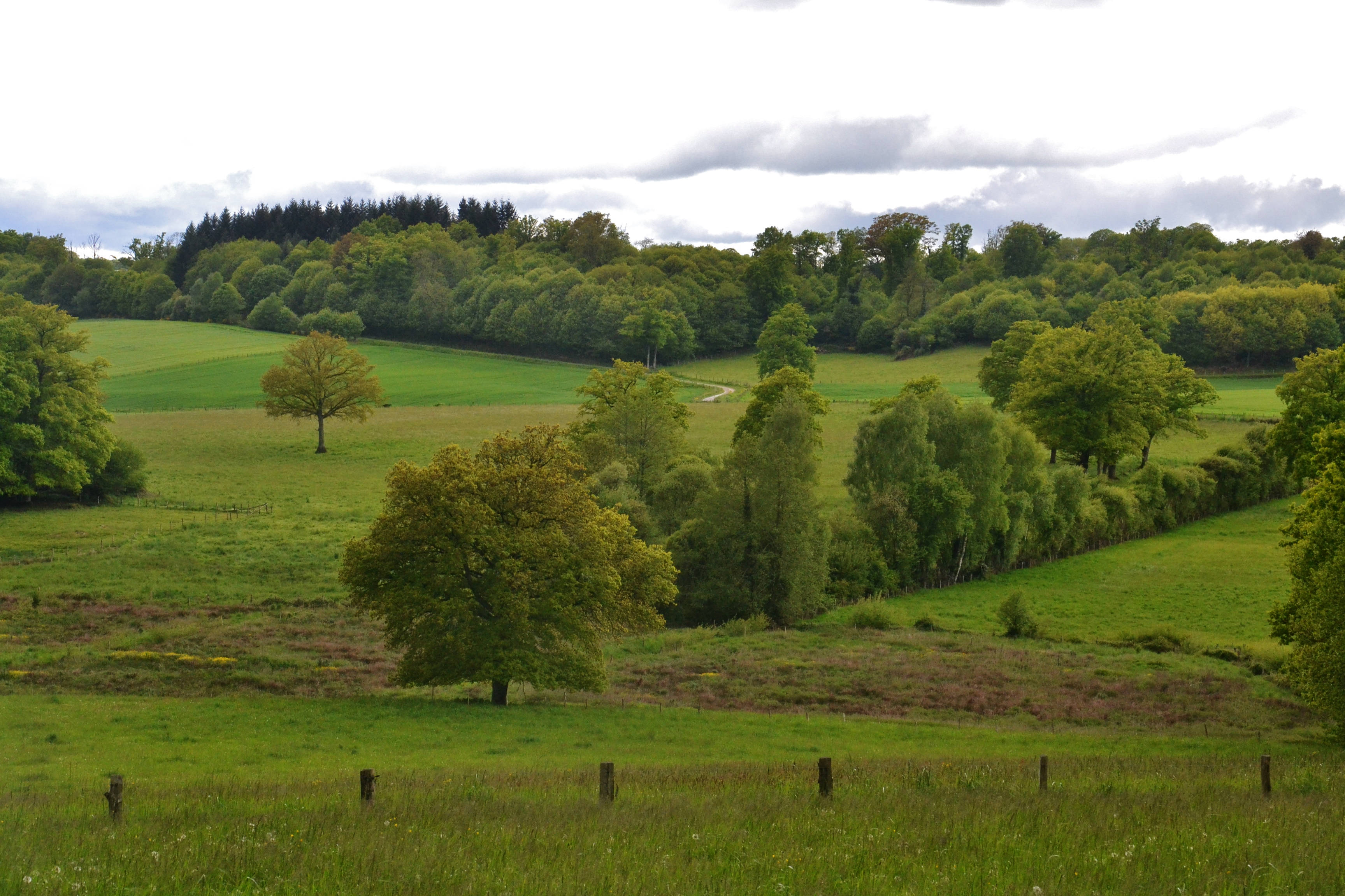 Paysage rural de semi-bocage ou campagne-parc, près de Saint-Maurice-la-Souterraine (Creuse, France)